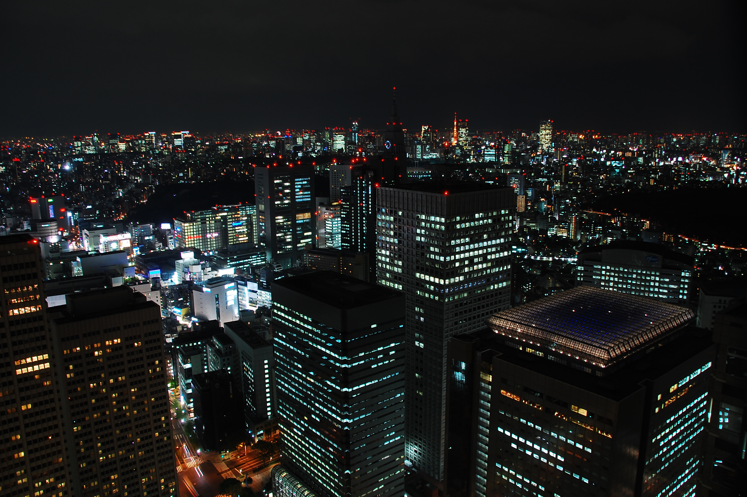 東京都庁展望室から南東方面 20130419